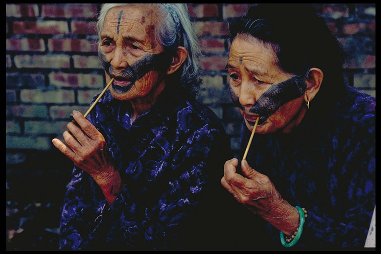 苗栗縣泰安鄉大興部落兩位泰雅族老年女性。